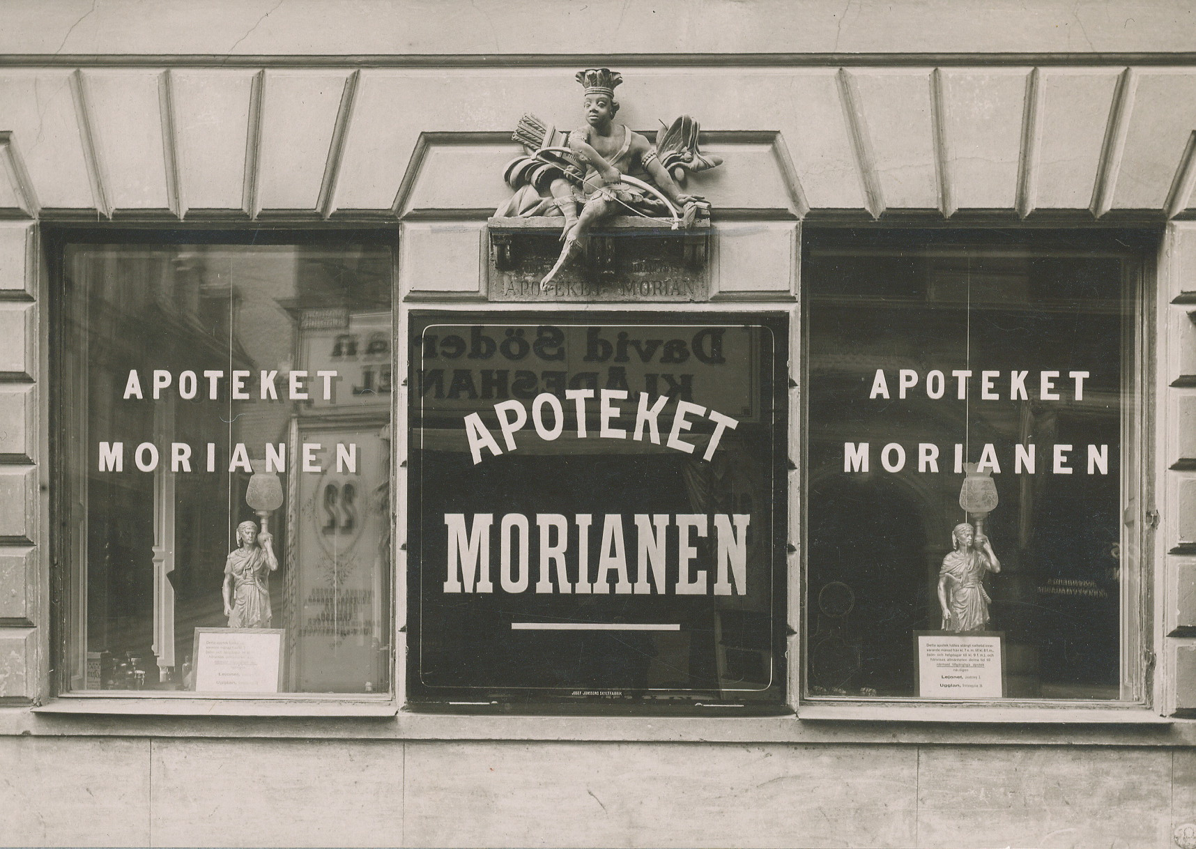 På Drottninggatan låg under flera hundra år Apoteket Morianen. Sista perioden innan rivningen låg apoteket på Drottninggatan 23.